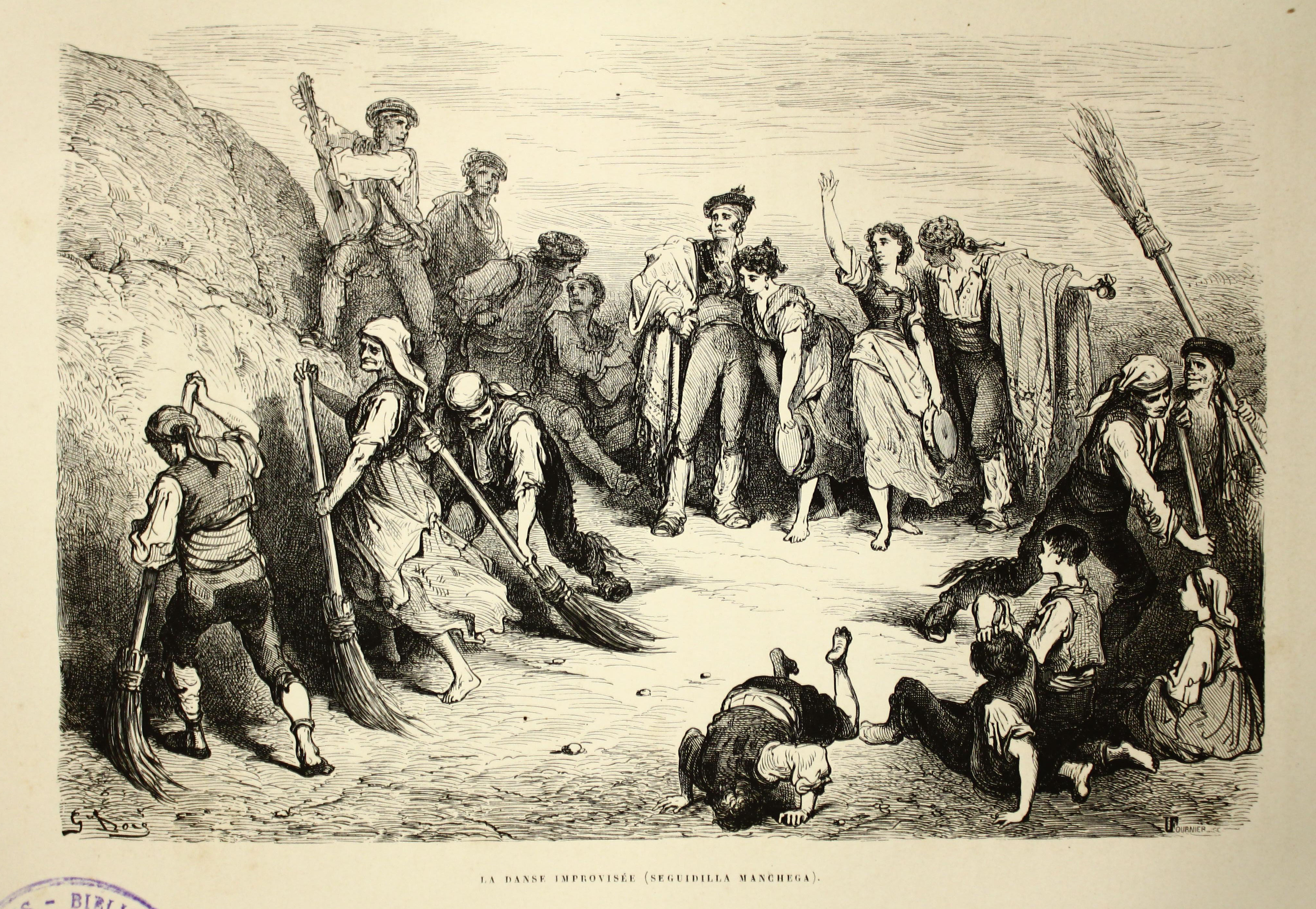 Autor: Davillier, Jean Charles, barón, 1823-1883 Descripción bibliográfica: L'Espagne / par Le Baron CH. Davillier ; ilustrée de 309 gravures dessinées su bois par Gustave Doré. - Paris : Librairie Hachette, 1874. - 799 p. : il. Materia: España- Geografía Materia: España- Usos y costumbres Ilustrador: Doré, Gustave, 1832-1883 Editor: Libreria Hachette Lugar de impresión: Francia, París Localización: Libro completo